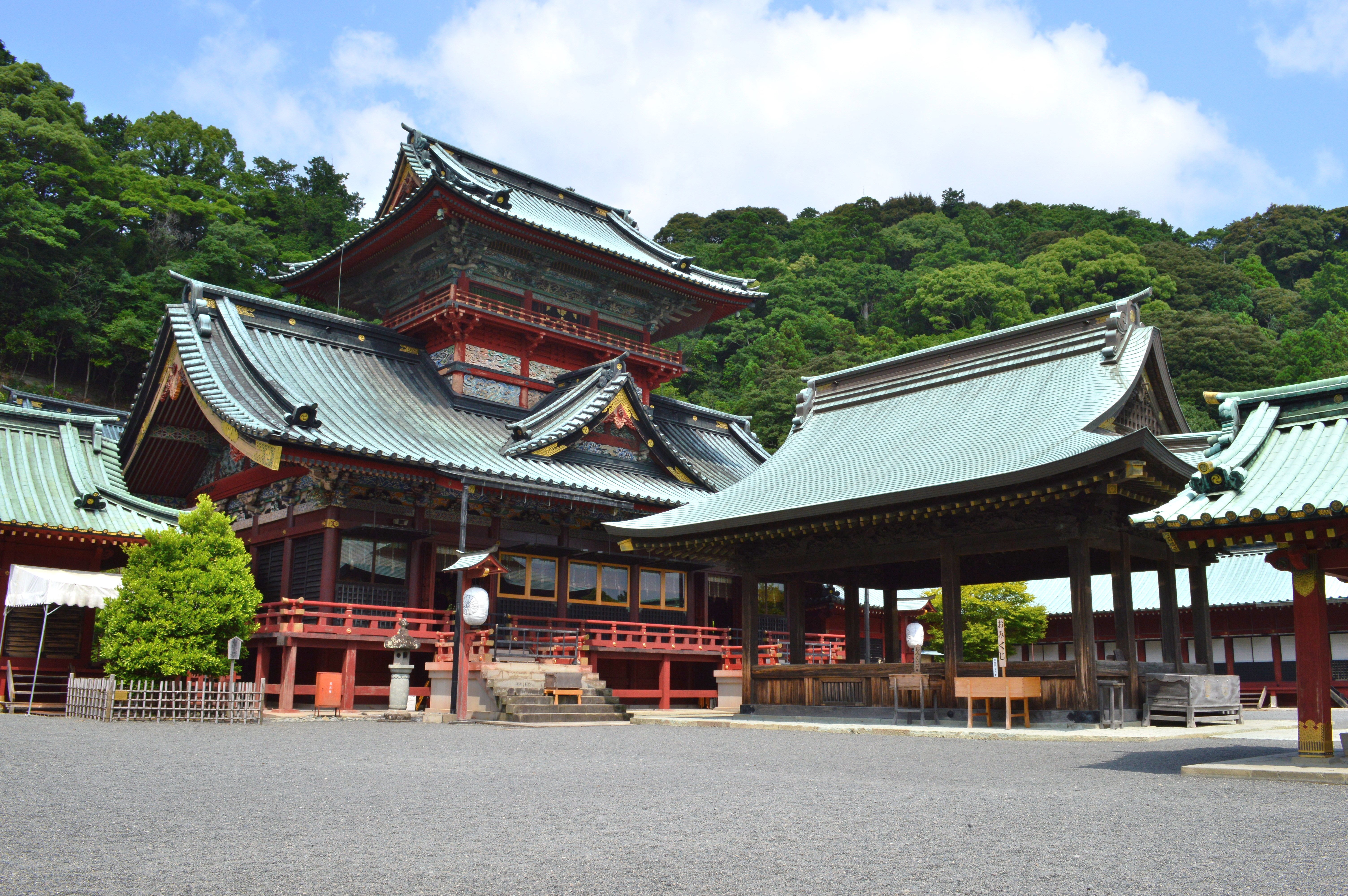 静岡浅間神社 神部神社・浅間神社大拝殿